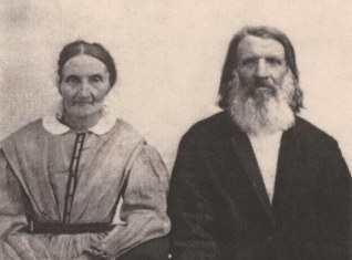 Johannes Romberg (1808-1891) mit Ehefrau Friederike Bauch (1812-1883)